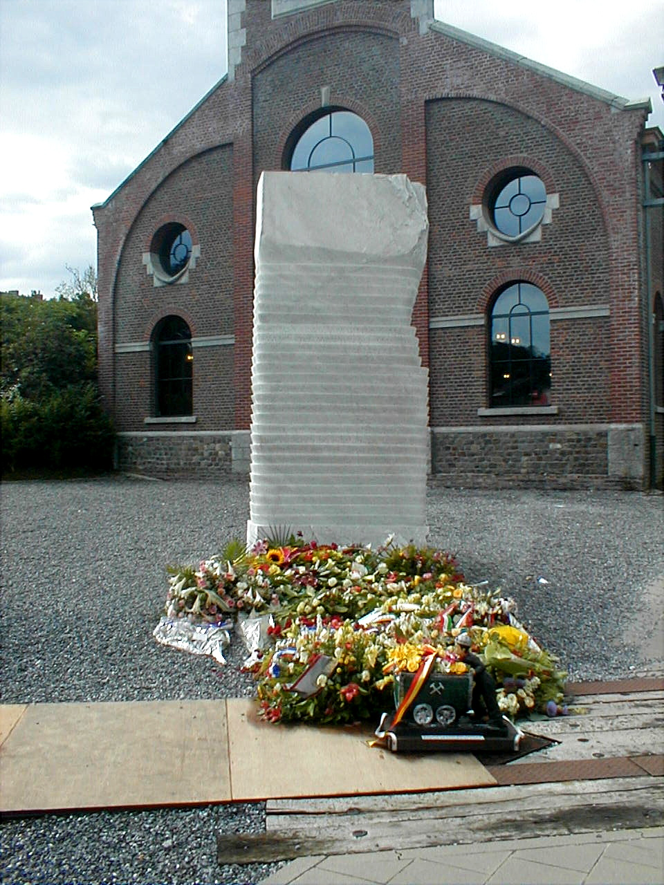 Monument dédié aux victimes du Bois du Cazier (Création du sculpteur Dominique Stroobant)